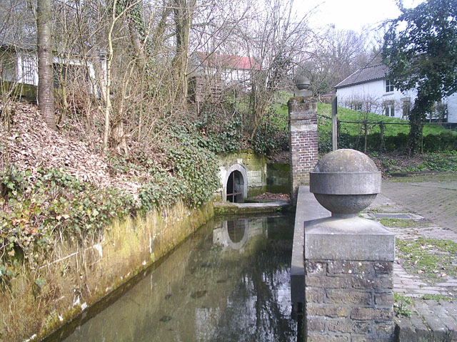 Sint Brigidabron te Noorbeek